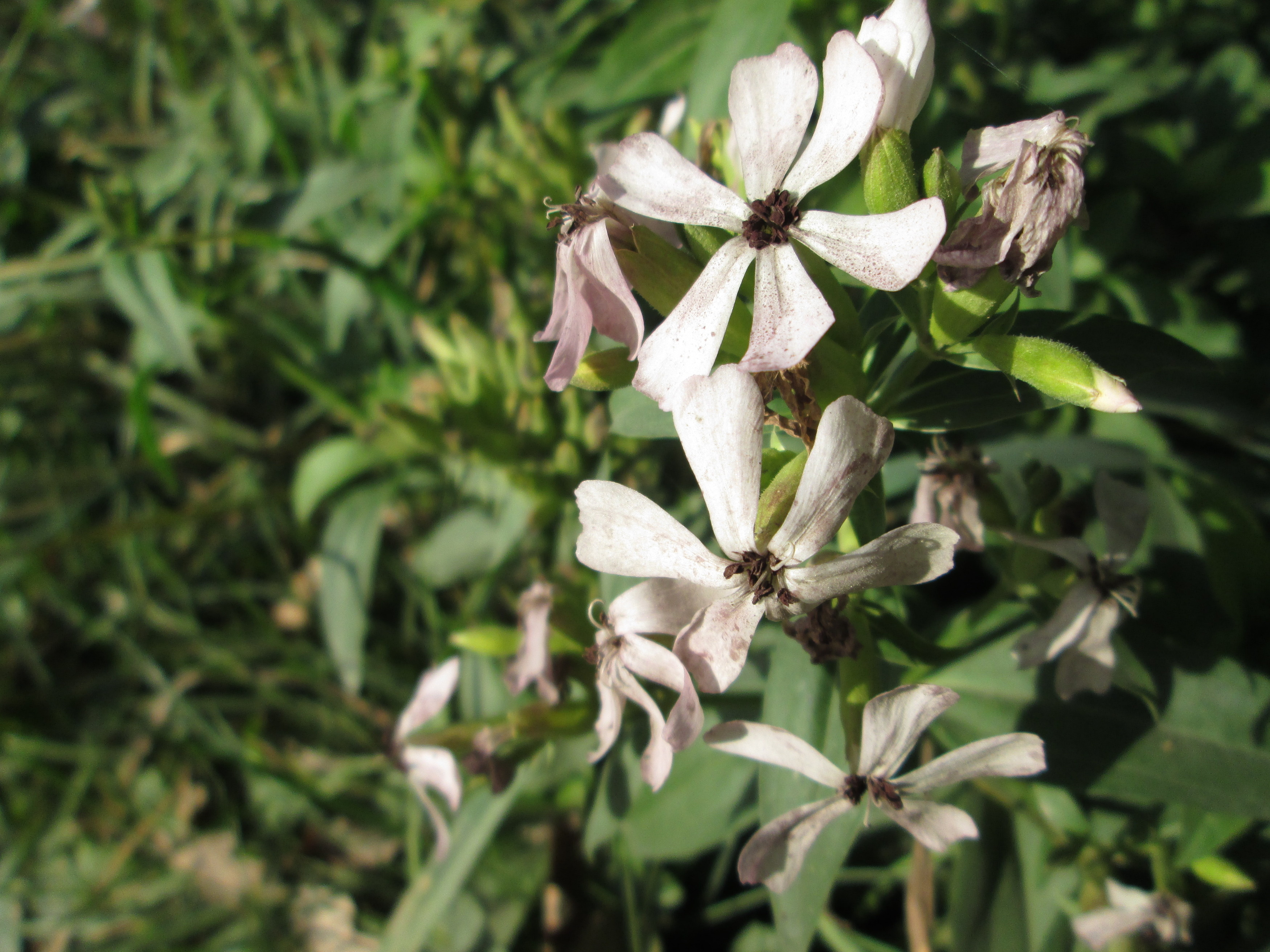 Gewöhnliches Seifenkraut (Saponaria officinalis) bei Hockenheim